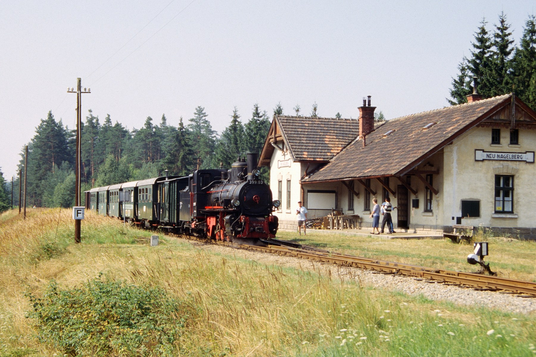 de: ÖBB 399.03 in Neu Nagelberg station on the northern branch of the Waldviertel Narrow Gauge Railways de: ÖBB 399.03 im Bahnhof Neu Nagelberg an der Nordstrecke der Waldviertler Schmalspurbahnen.